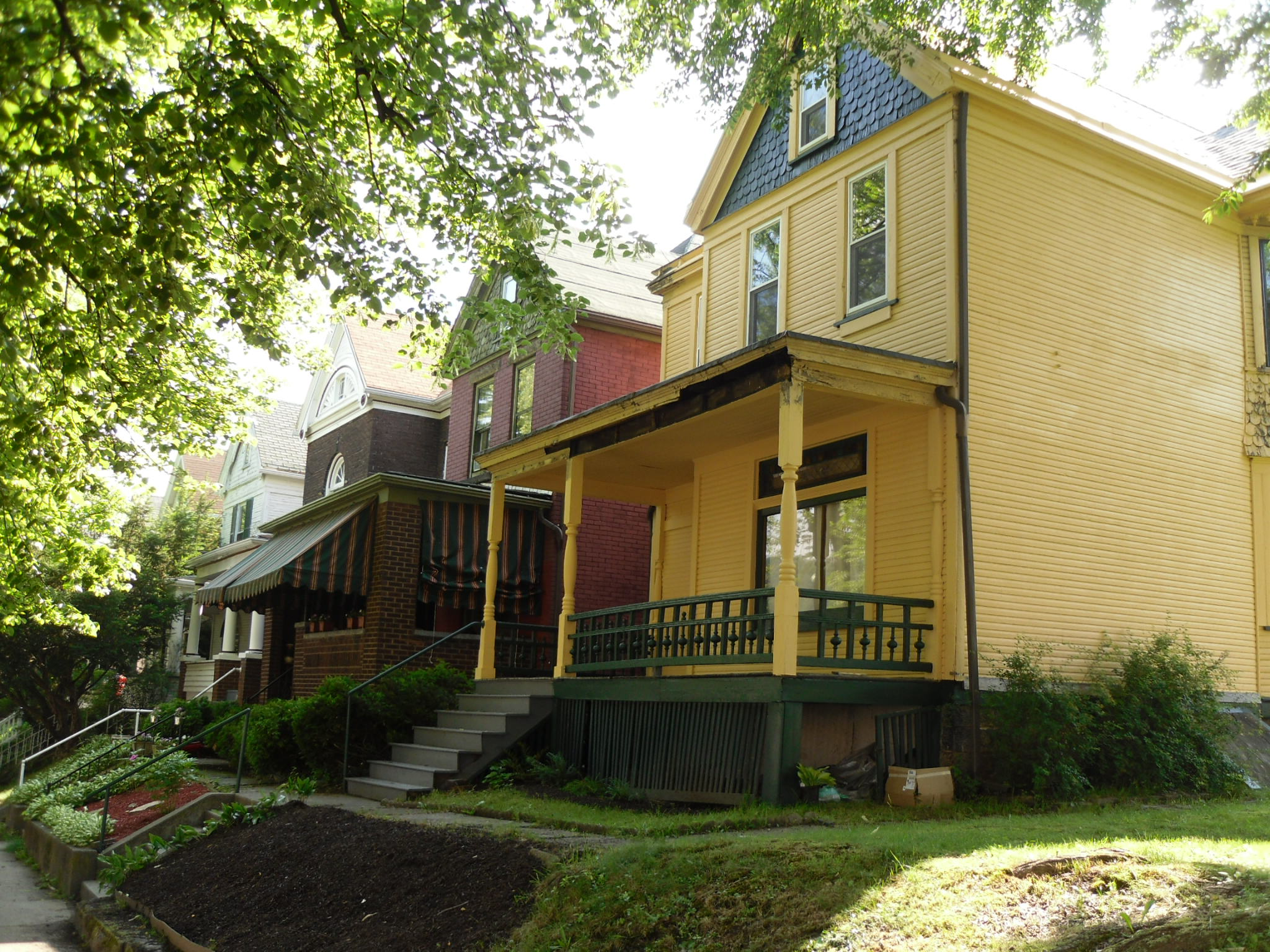 Vandergrift, Pennsylvania